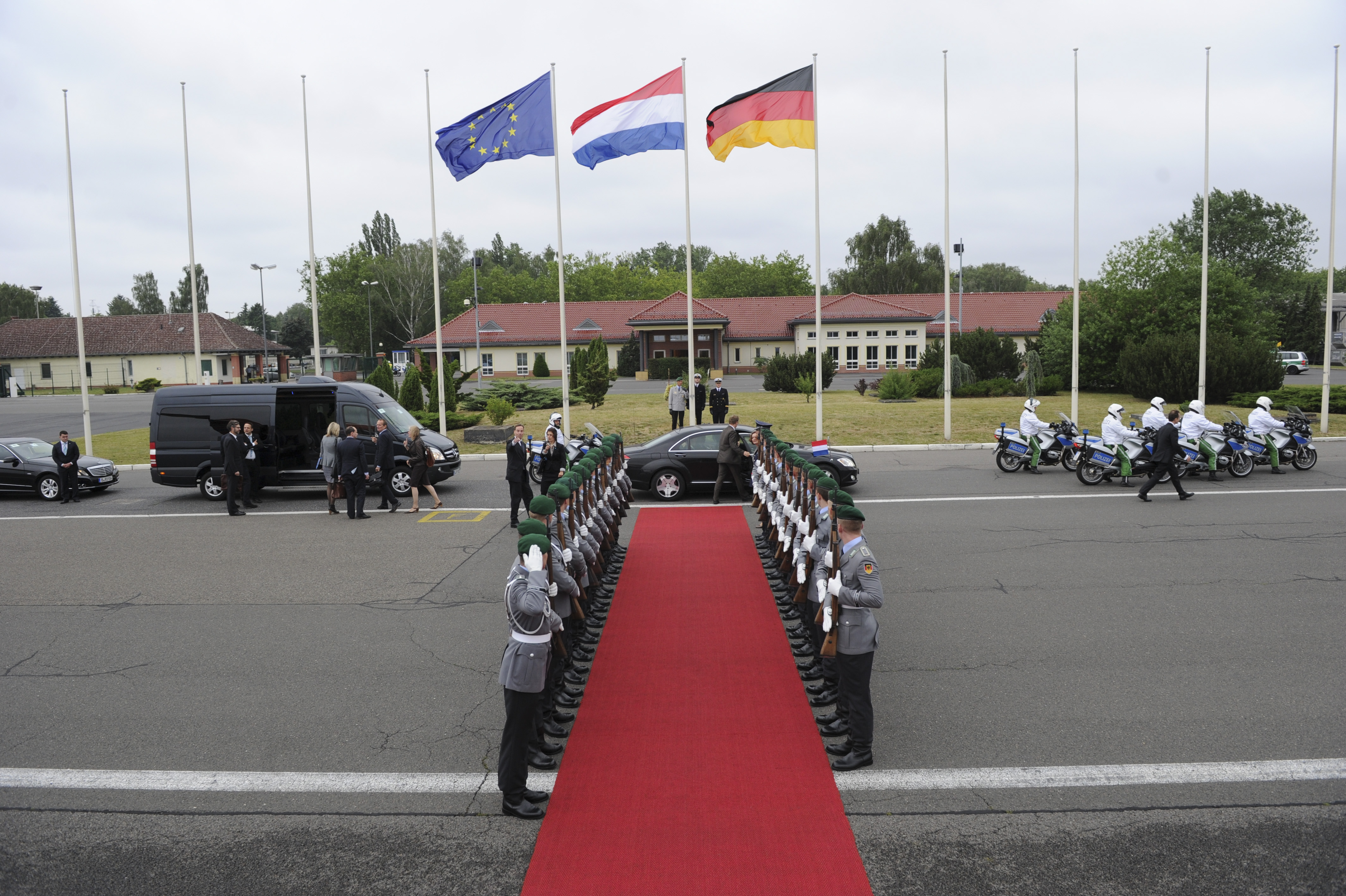 De aankomst op vliegveld Tegel in Berlijn.